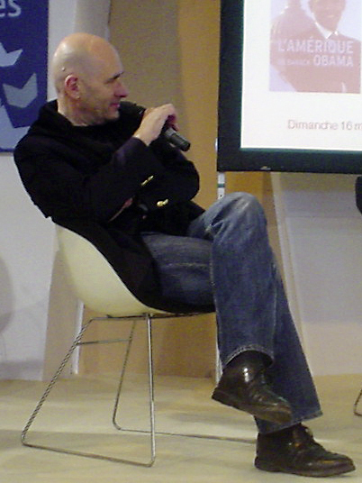 Jean Lebrun au salon du livre le 16 mars 2008 à Paris (porte de Versailles), dirigeant une émission en public et sur France Culture.